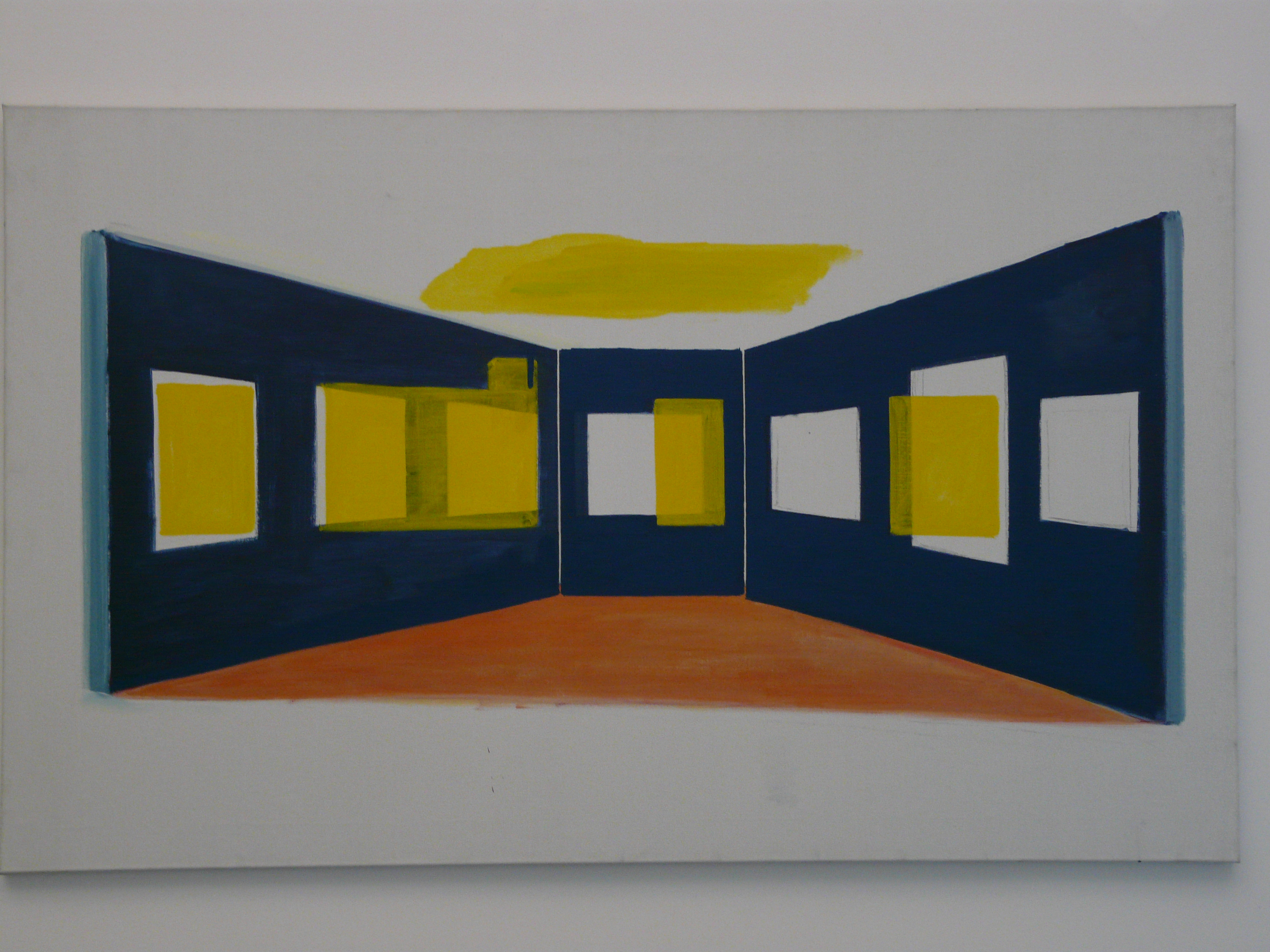 Schilderij van Rene Daniels